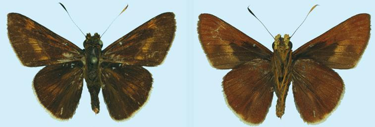 Mimene toxopei upperside (left), underside (right)